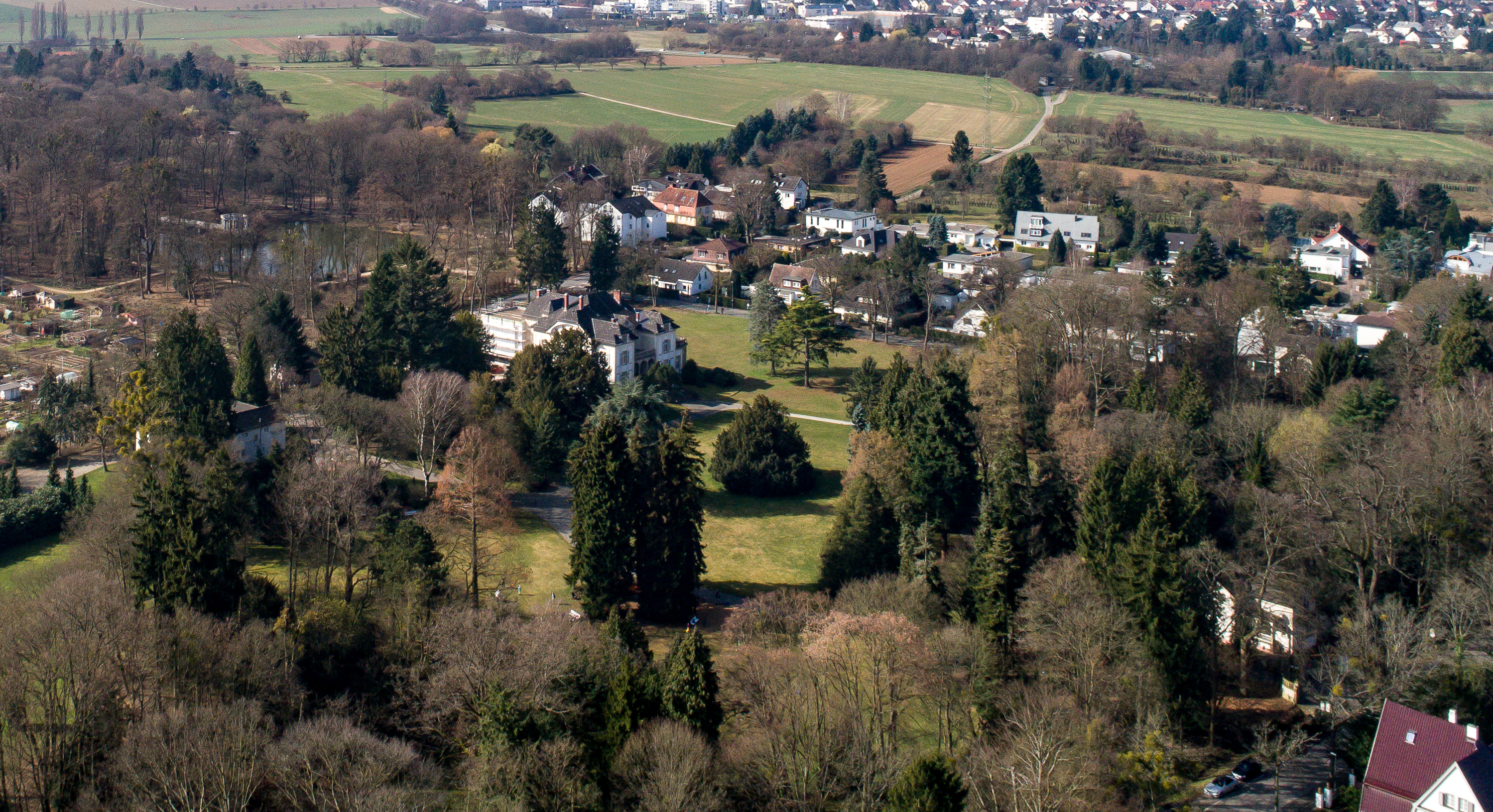 Bad Homburg, der Gustavsgarten an der Tannenwaldallee mit der Villa Wertheimber. Links davon der Kleine Tannenwald